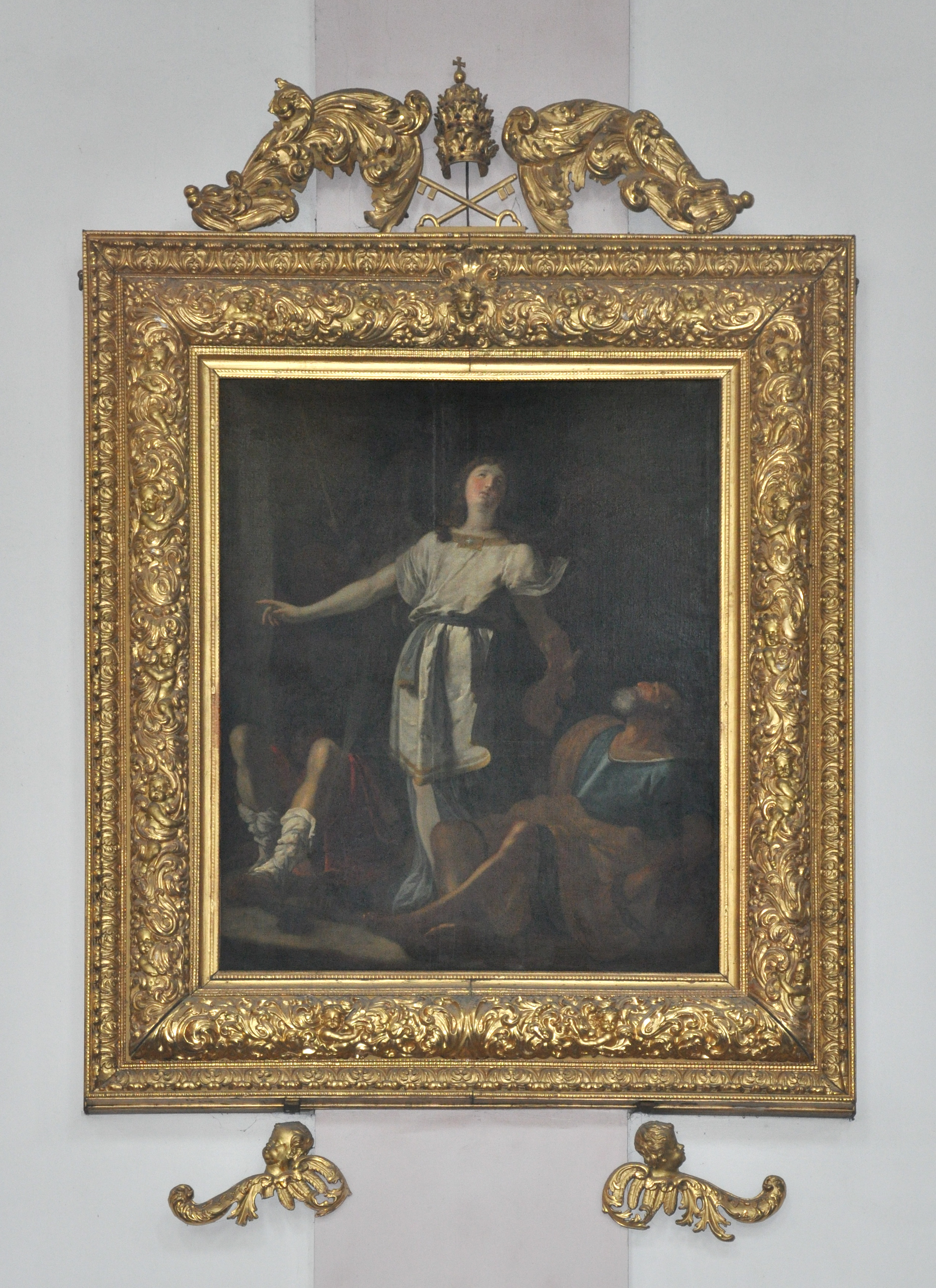 Stiftskirche Reichersberg, Oberösterreich Tafelbild „Petri Befreiung aus dem Kerker" von Johann Heinrich Schönfeld, um 1650–1670 (1700 in München erworben), in holzgeschnitztem Rahmen von Thomas Schwanthaler (wohl 1702) Johann Heinrich Schönfeld (1609–1684) DescriptionGerman painter and engraverDate of birth/death 23 March 1609 1684 Location of birth/death Biberach a. d. Riß AugsburgWork location Naples, Rom, AugsburgAuthority control : Q278623 VIAF: 87238114 ISNI: 0000 0001 1773 5255 ULAN: 500019429 LCCN: nr93029281 MusicBrainz: 020f193e-df49-4acb-bdb8-9389e100b15b WorldCat creator QS:P170,Q278623